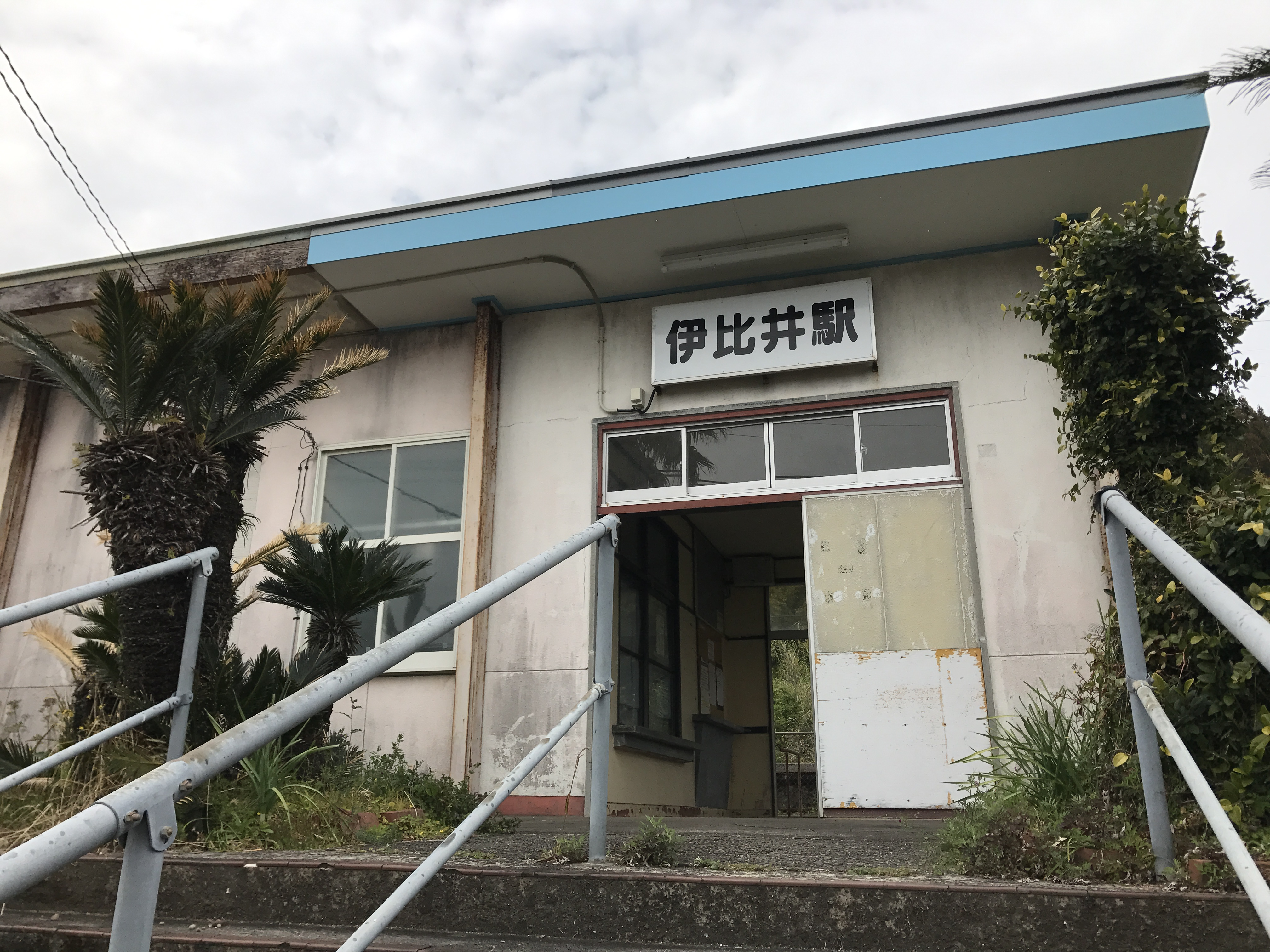 伊比井駅の入り口